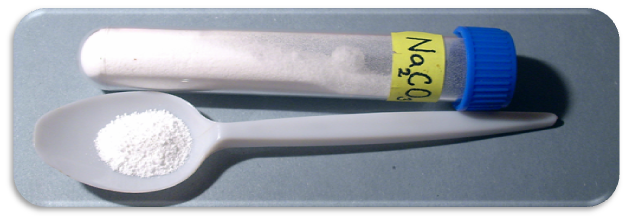 Uhličitan sodný - Na2CO3